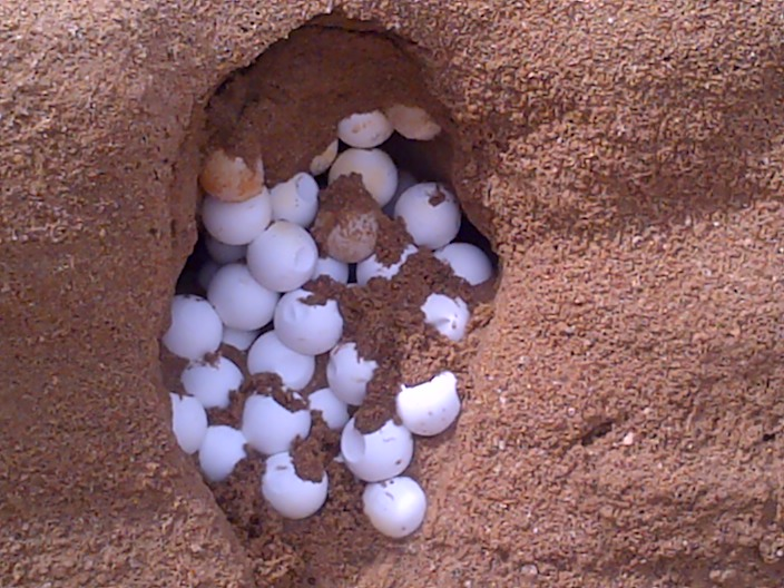 Dit is een nest van verloren Krape eieren